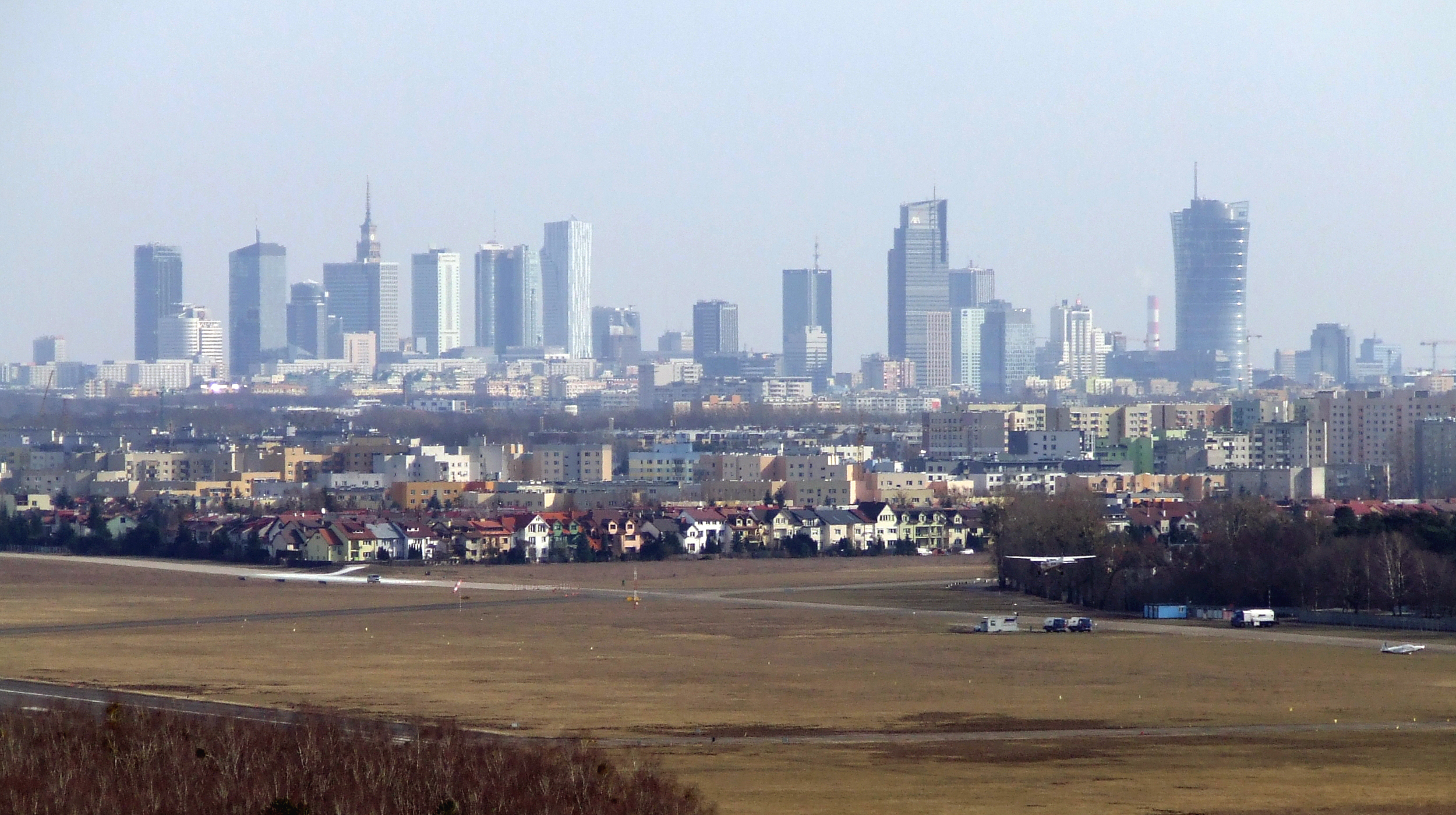 Warszawa widziana z góry śmieciowej Radiowo